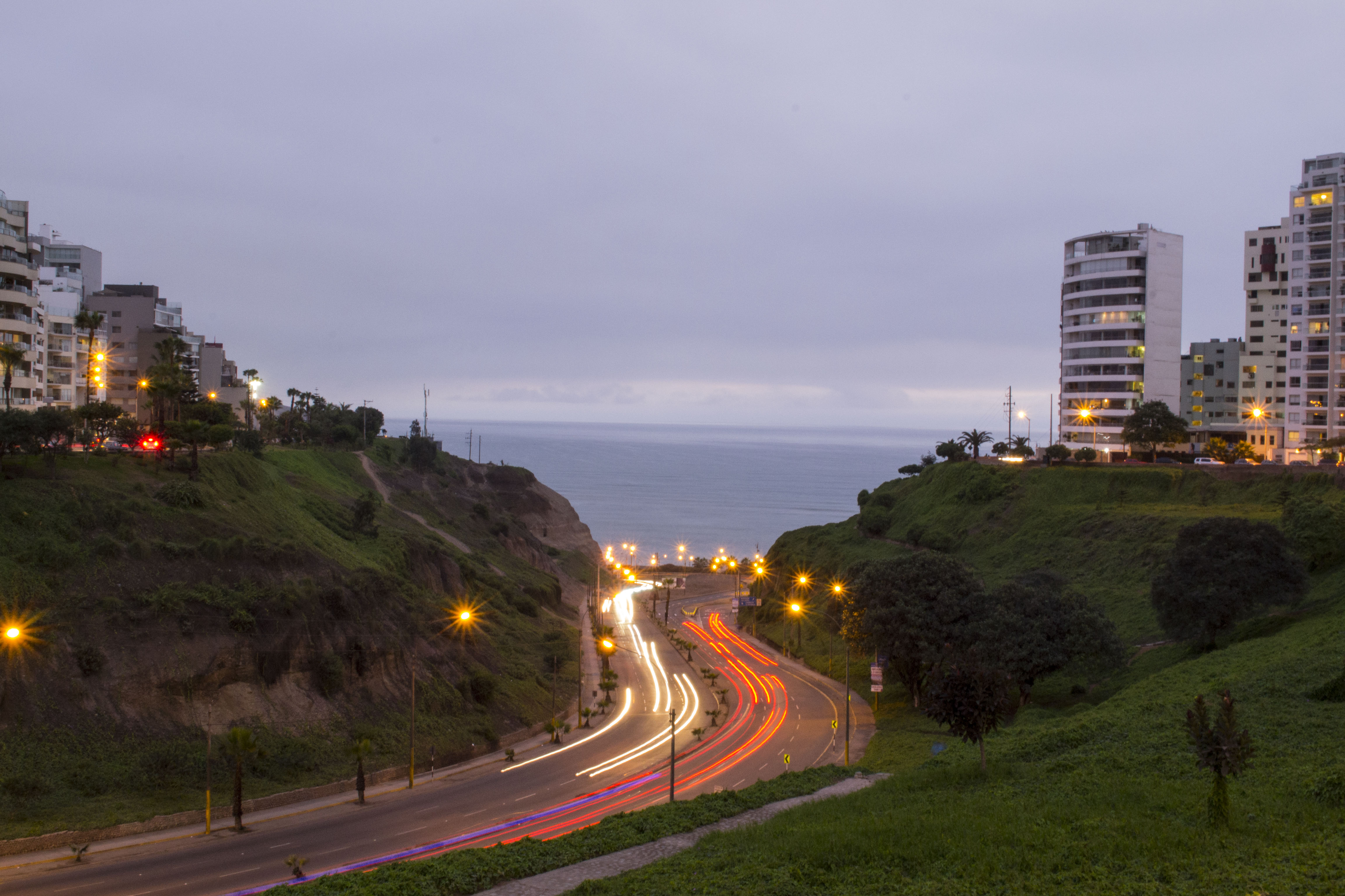 Autopista emblemática del distrito de Miraflores, Lima. Perú. Fotografía tomado por Fernando Dedios